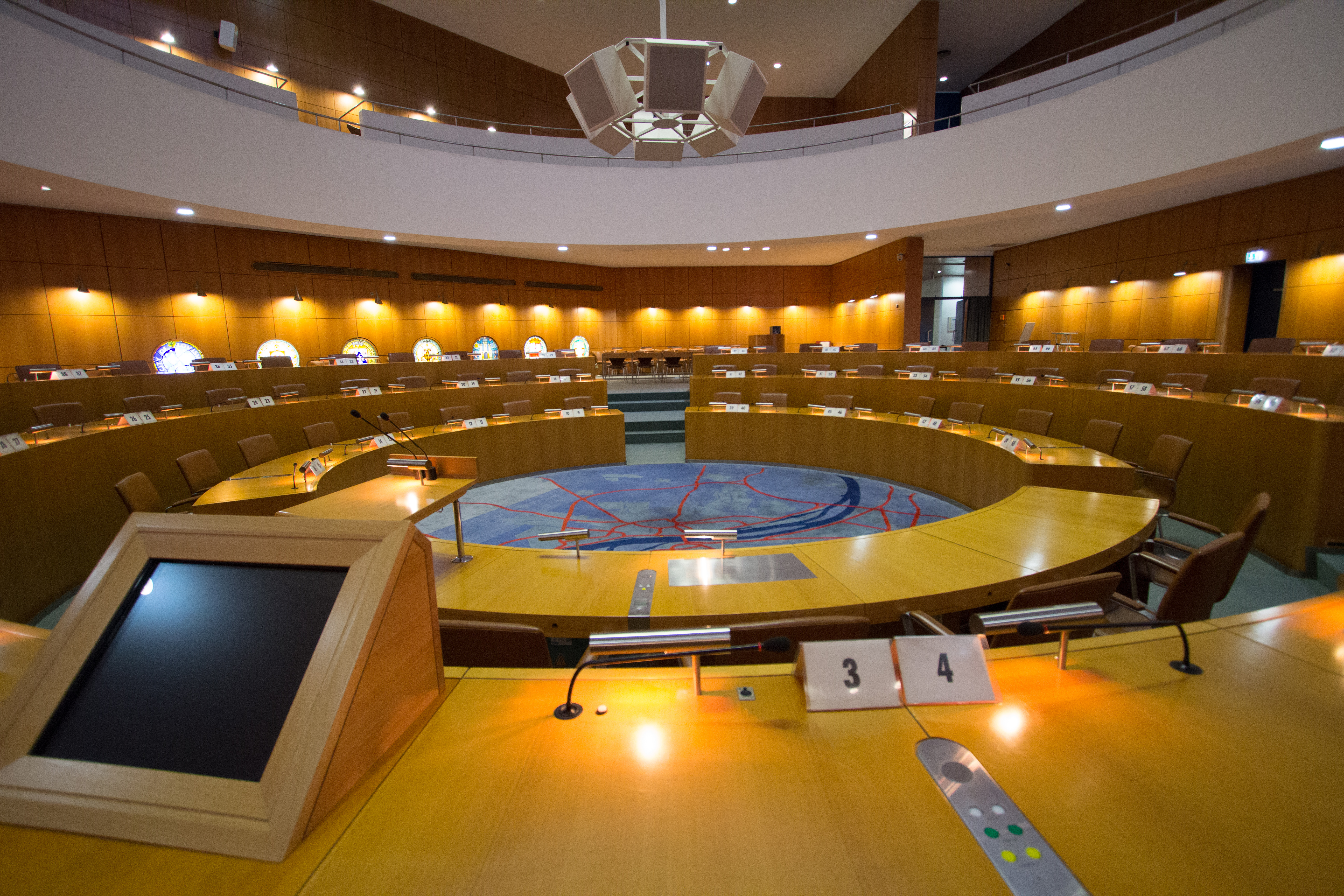 Ratssaal im Mainzer Rathaus am 13. November 2017